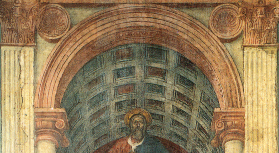 detail